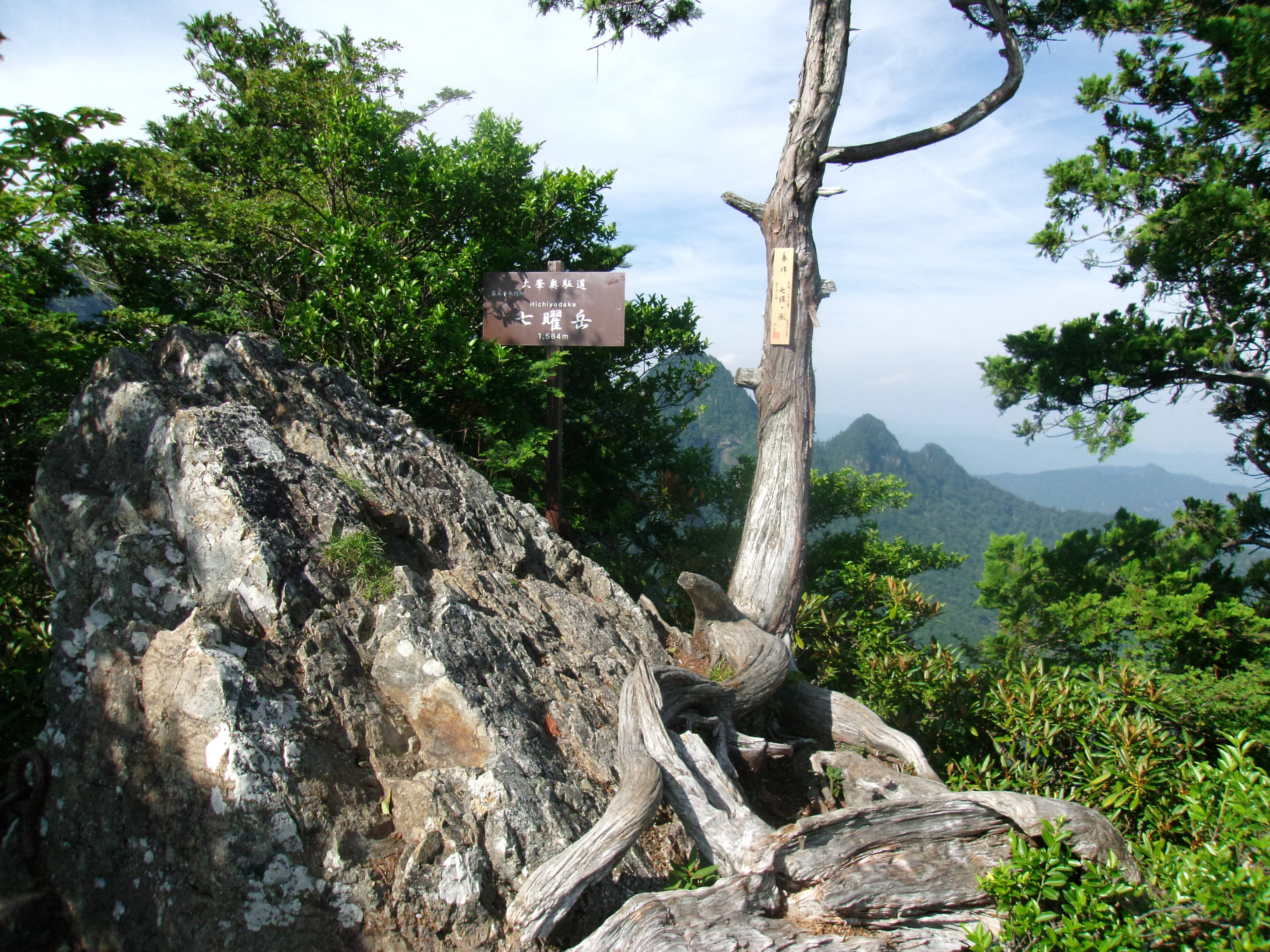 大峯奥駈道第59靡「七曜岳」山頂